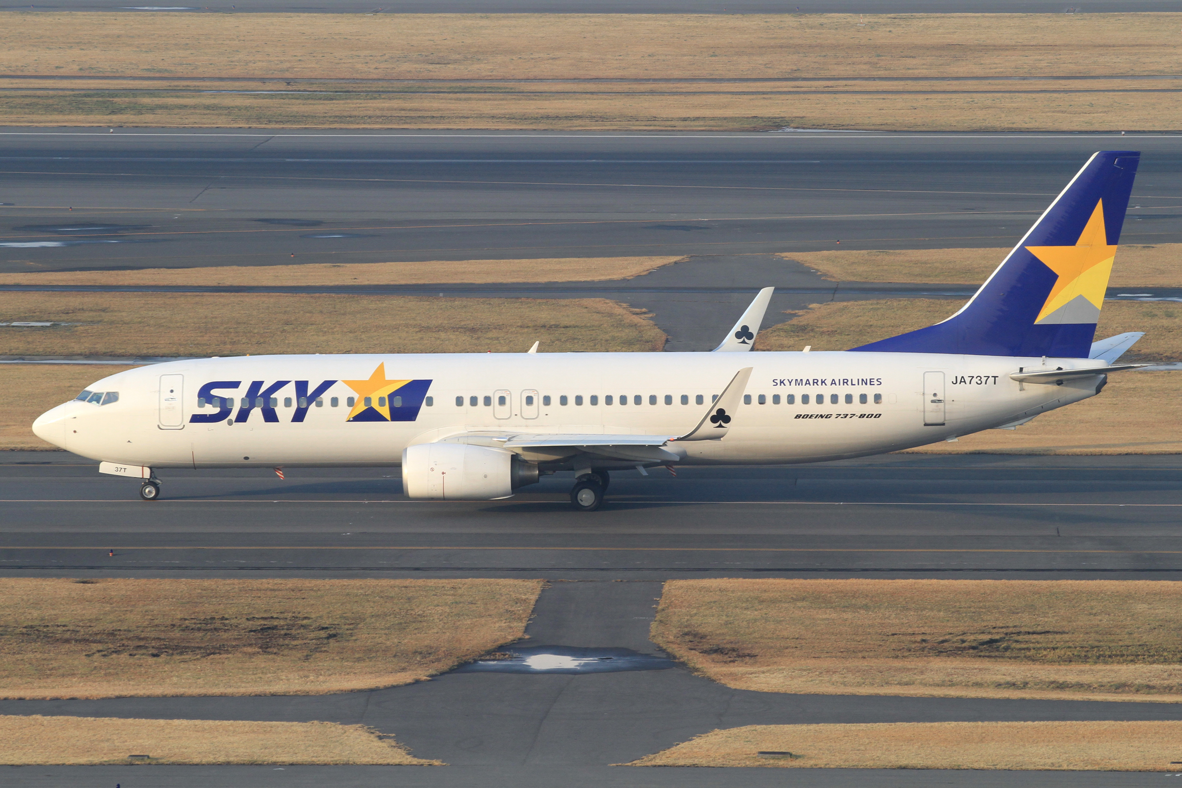 Boeing 737-8Q8, c/n:35290, Skymark Airlines